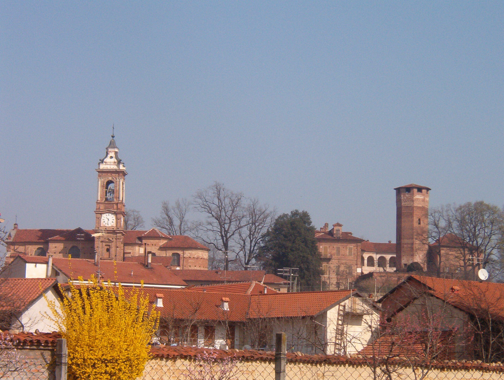 Panorama Sommariva del Bosco - Provincia di Cuneo - Piemonte - Italia